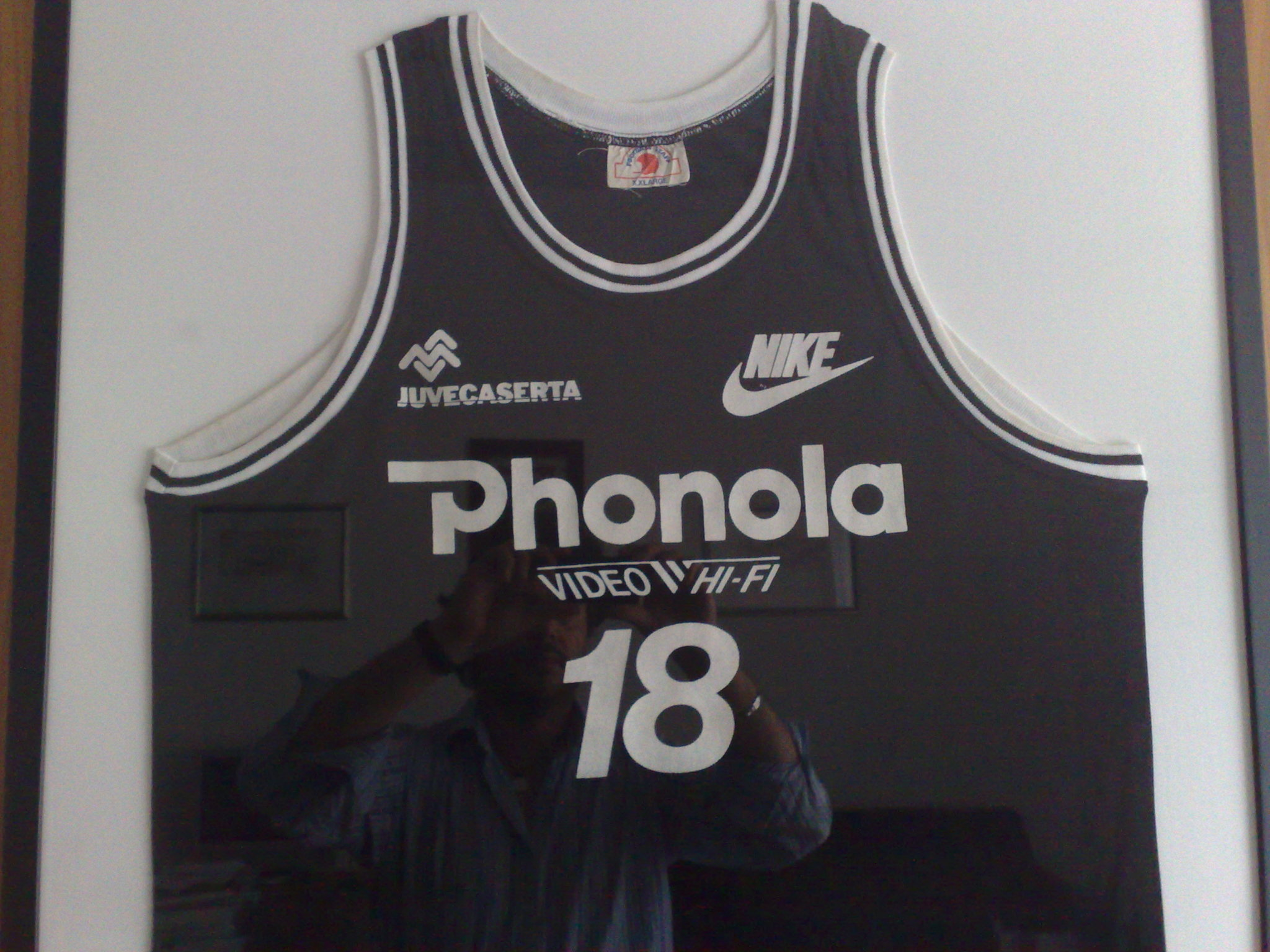 È una mia foto di un m io oggetto. Chiaro?